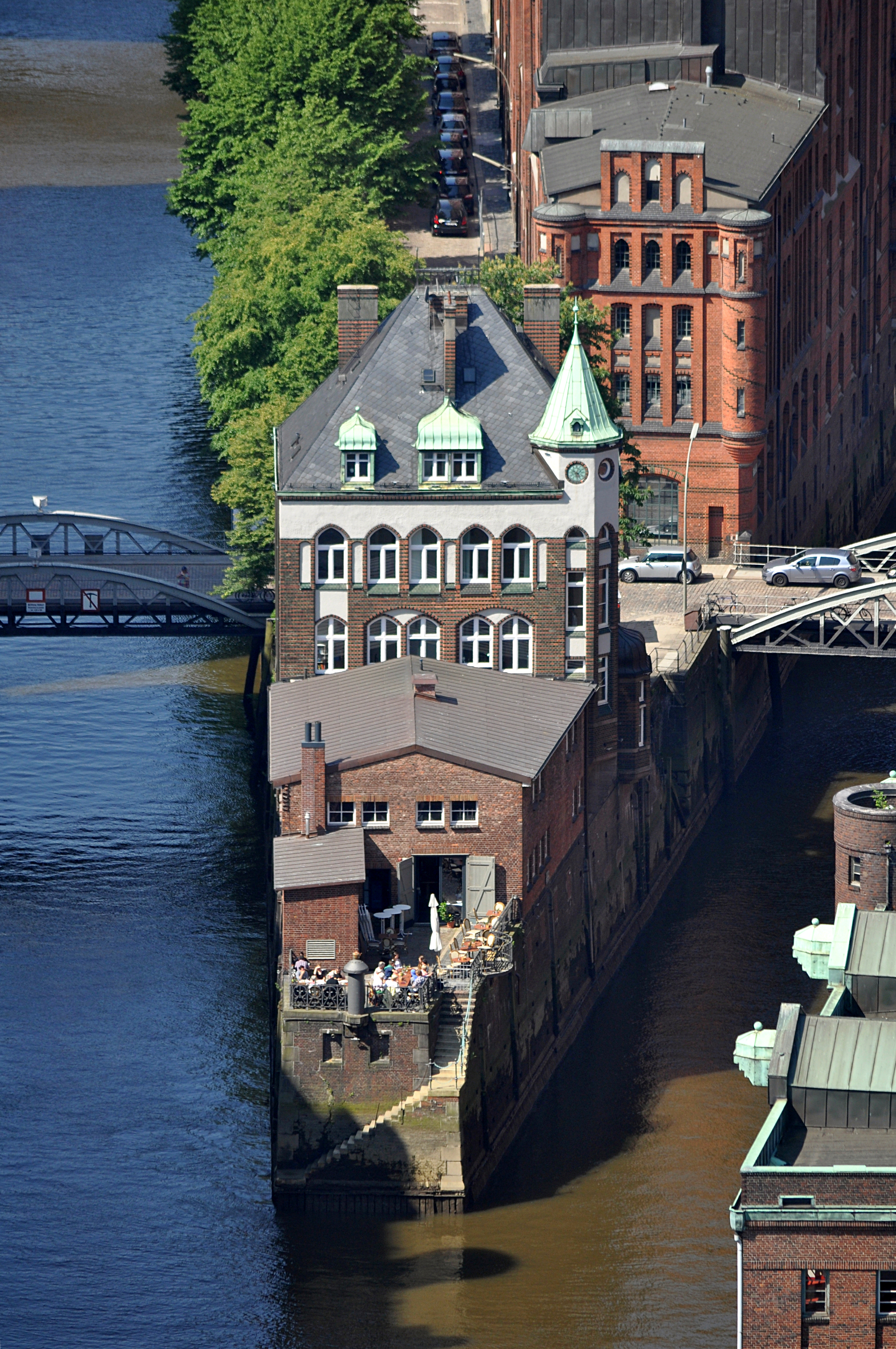 Wasserschloss am Zusammenfluss des Holländischbrook- und des Wandrahmfleets in der Speicherstadt in Hamburg-HafenCity. This is a photograph of an architectural monument.